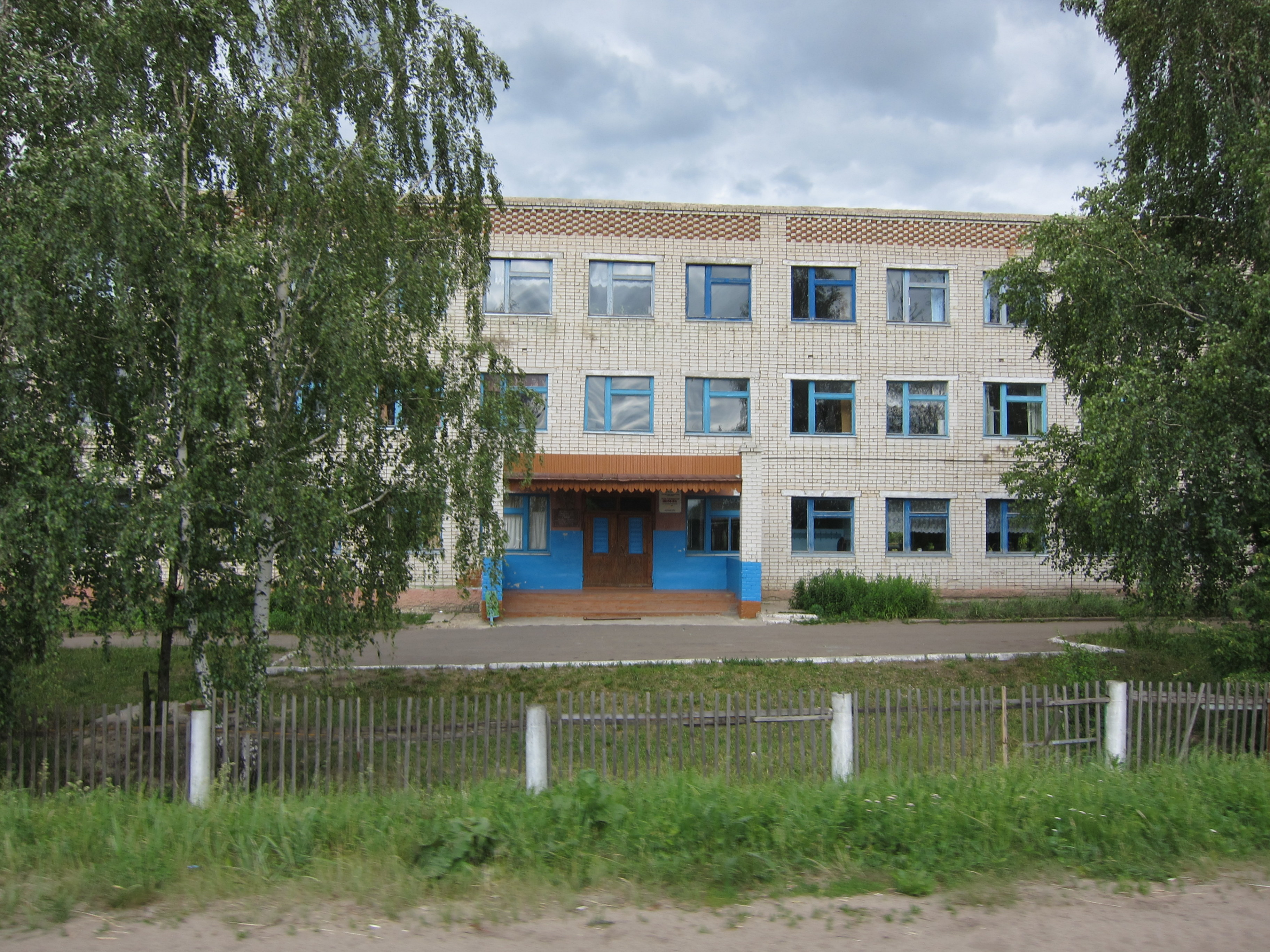 Общий вид крыльца школы